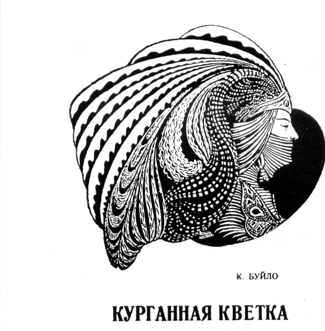 Вокладка кнігі К. Буйло "Курганная кветка". Вільня, 1914. Друкарскі адбітак.